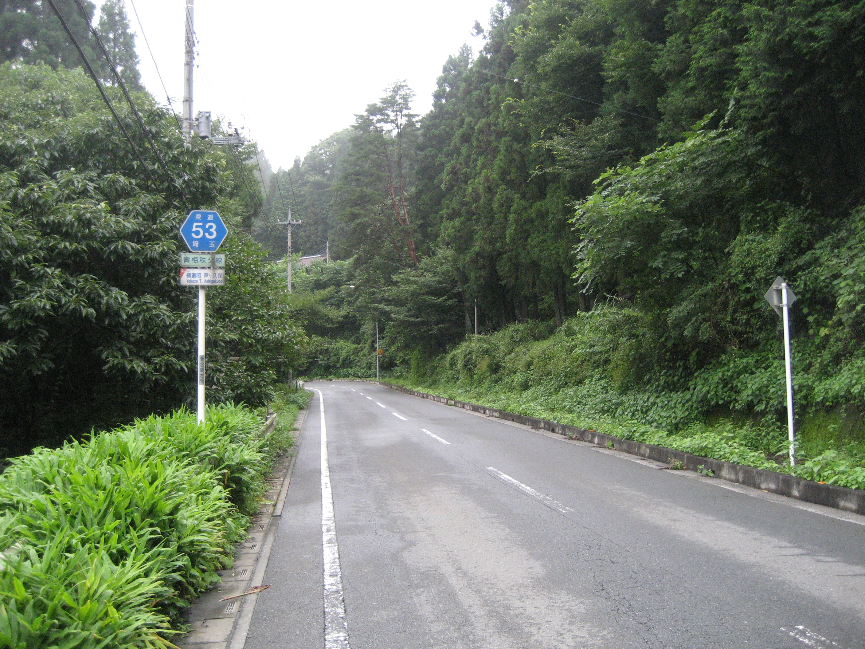 埼玉県道53号線横瀬町内